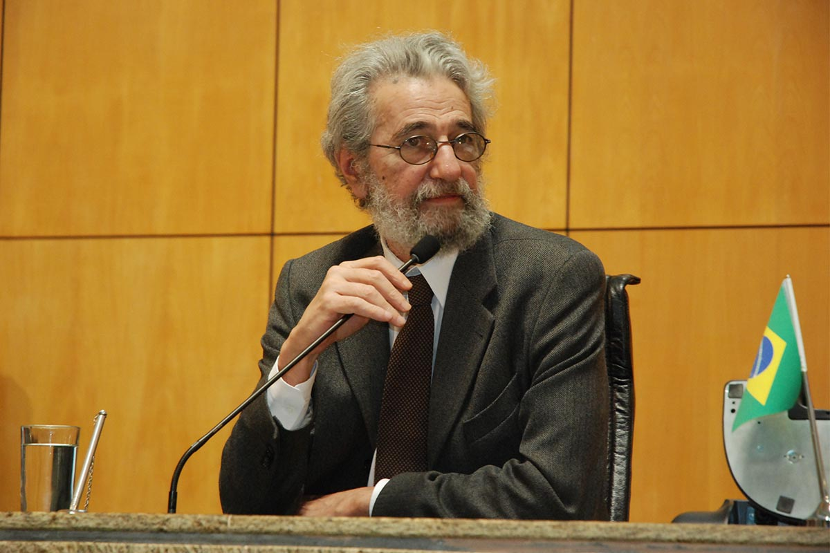 Cláudio Weber Abramo, jornalista brasileiro, preside a ONG Transparência Brasil.